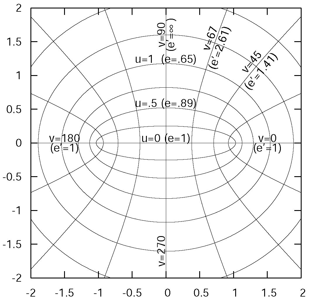 EllKoor